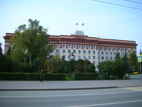 La Tjumena provinca dumao (Tjumeno, Rusio) Тюменская областная дума